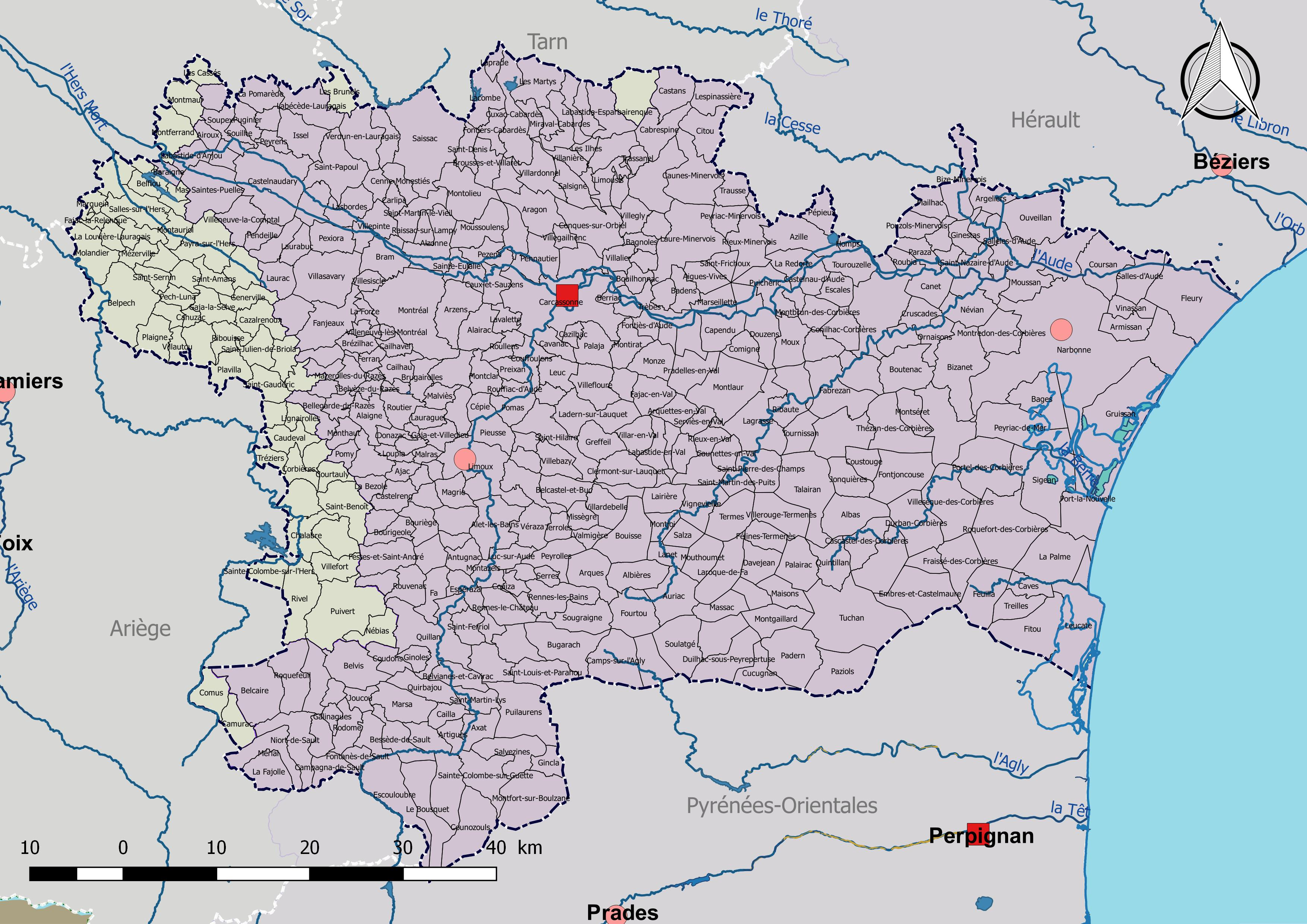 Découpage du département de l'Aude (France) en bassins Directive-cadre sur l'eau (bassins DCE).